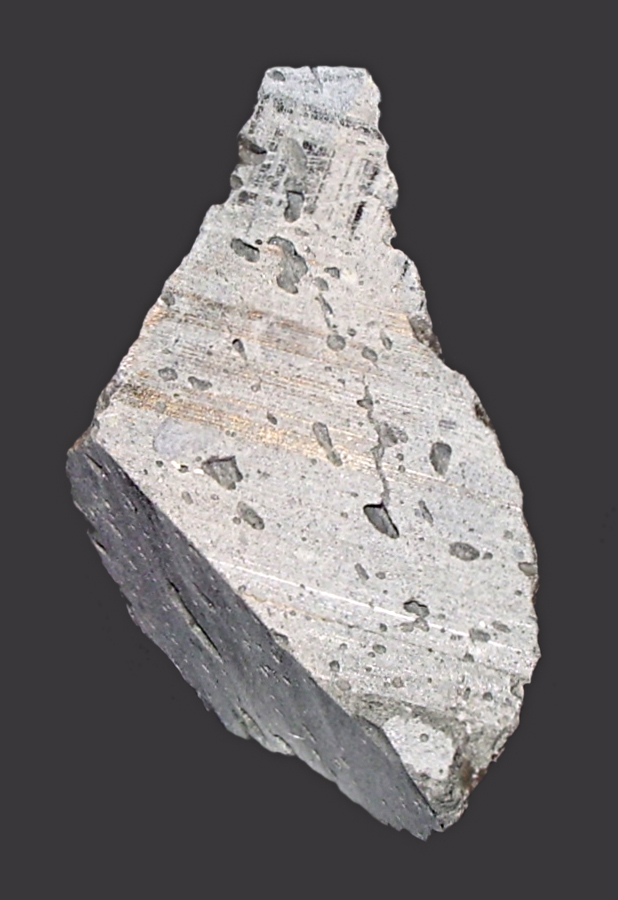 Mondgestein (Teil der Probe Nr. 76015), während der Apollo-17-Mission auf dem Mond aufgesammelt, etwa 3,9 Milliarden alt, Blick auf gesägte Flächen. Es handelt sich hierbei um eine blasige Impaktbrekzie, vorwegend bestehend aus Pyroxen, Olivin und Anorthit.[1] ↑ C. Meyer: Lunar sample Compendium: 76015 – Vesicular Micropoikilitic Impact Melt Breccia.